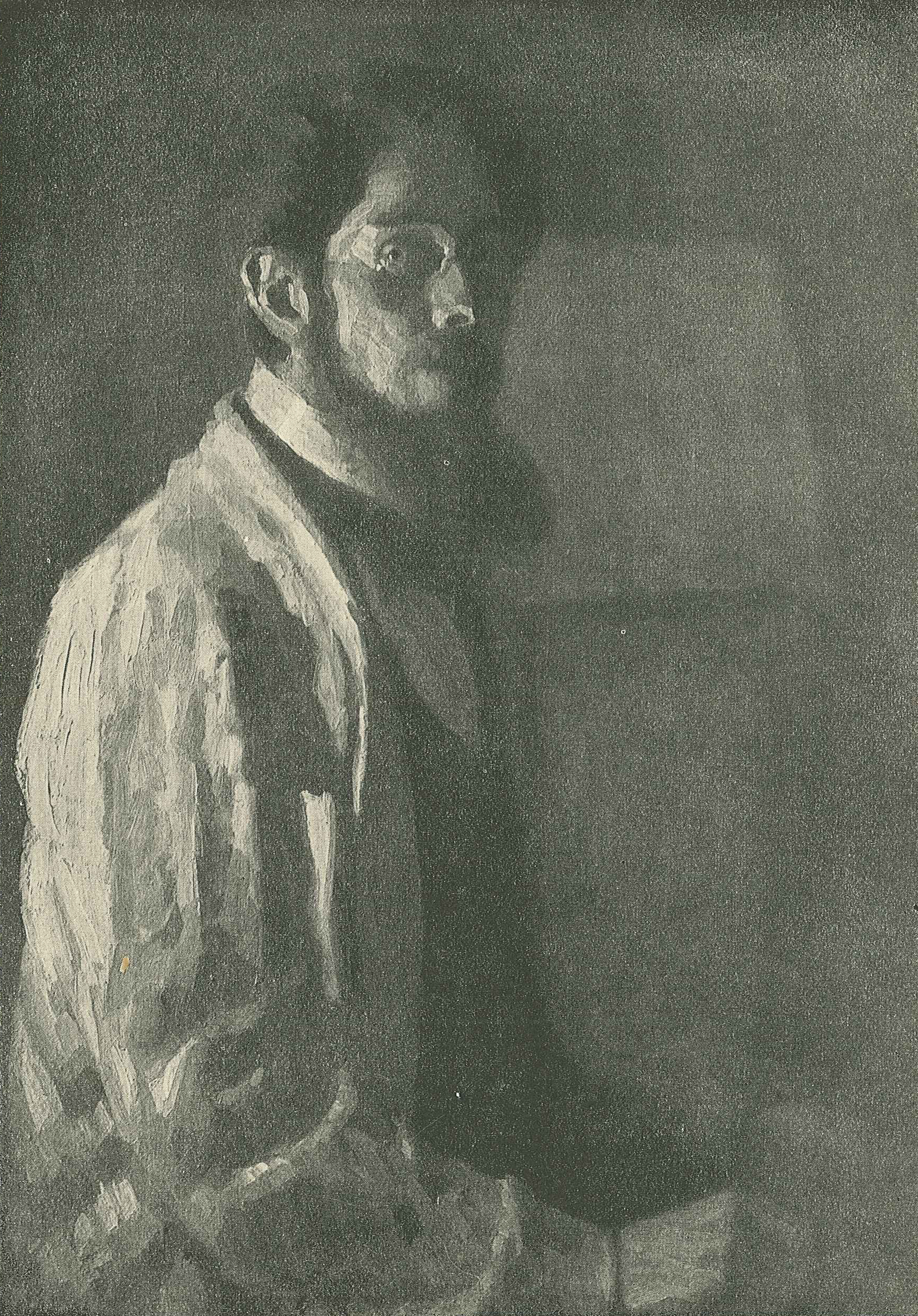 Self-portrait